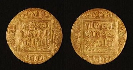 Dinar hafside frappée à Tunis (ou à Bijaya, actuelle Algérie) entre 647-675 H / 1249-1277 AD, durant le règne de Abu Abd-Allah Muhammad Al-Mustansir Billah al-Mansûr, conservée au Musée des arts islamiques de Raqqada, Kairouan, Tunisie. En or, diamètre: 29 mm.